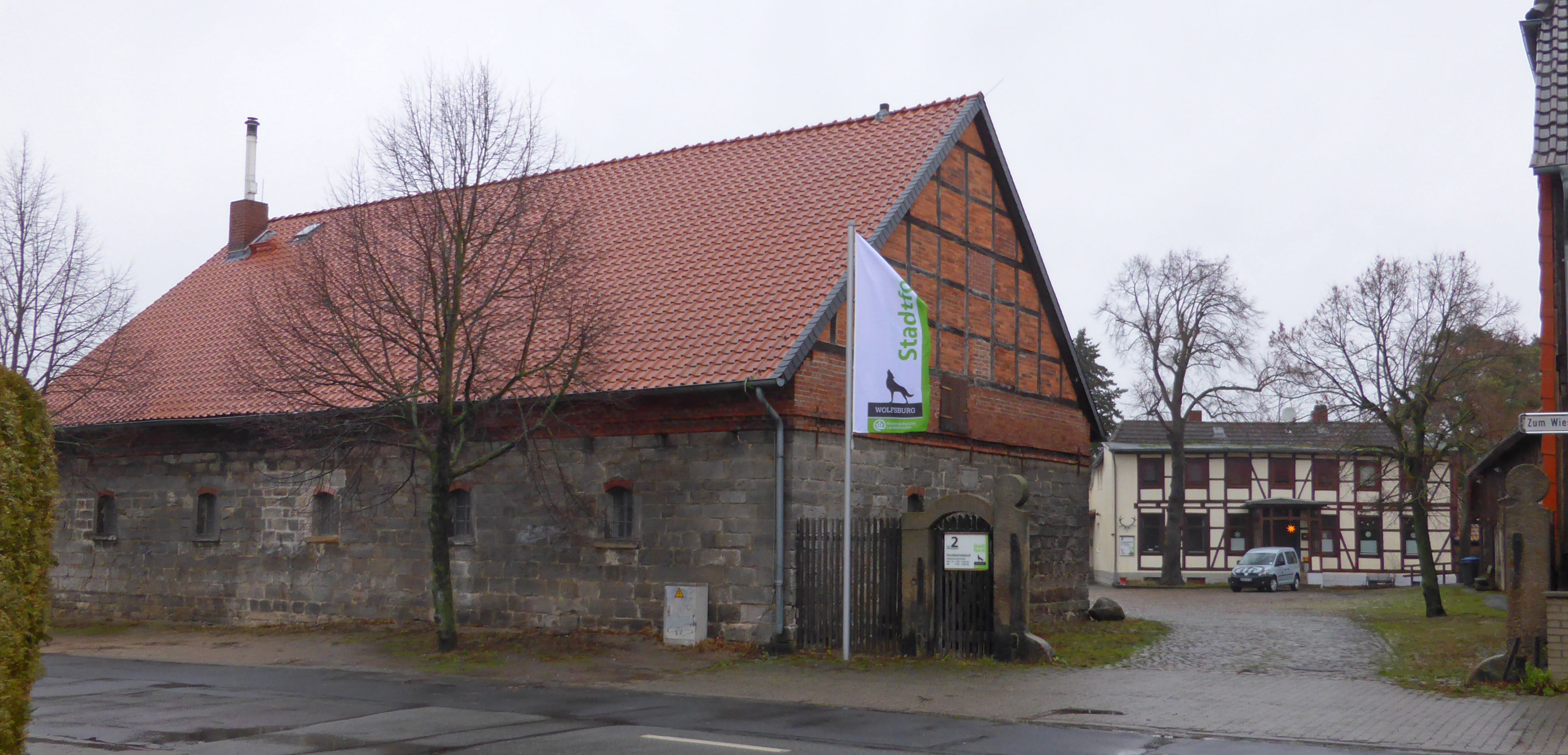 Margarethenhof in Reislingen, Straßenansicht.